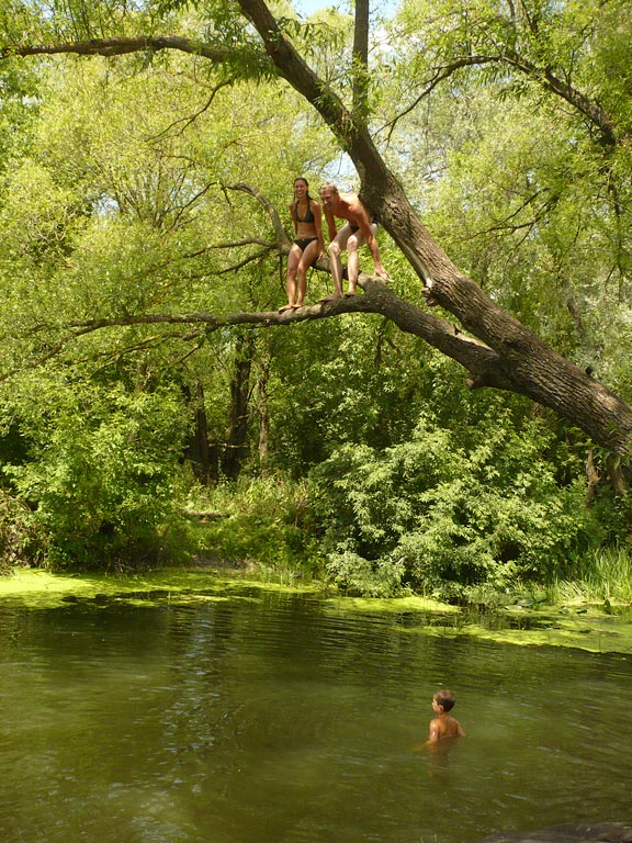 Река Корень в селе Кошлаково (Шебекинский район Белгородской области). Июнь 2009 г.